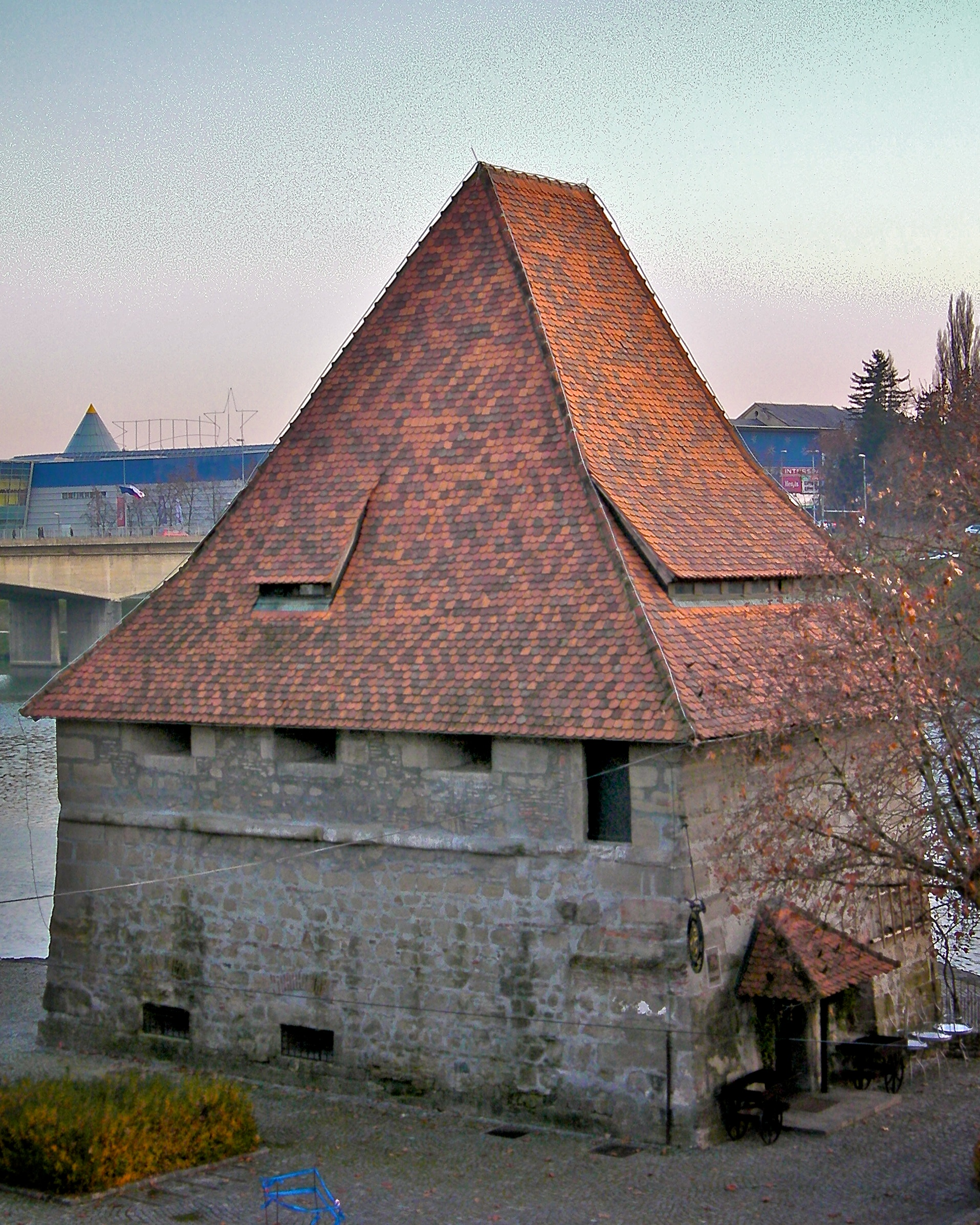 Vodni stolp, Maribor